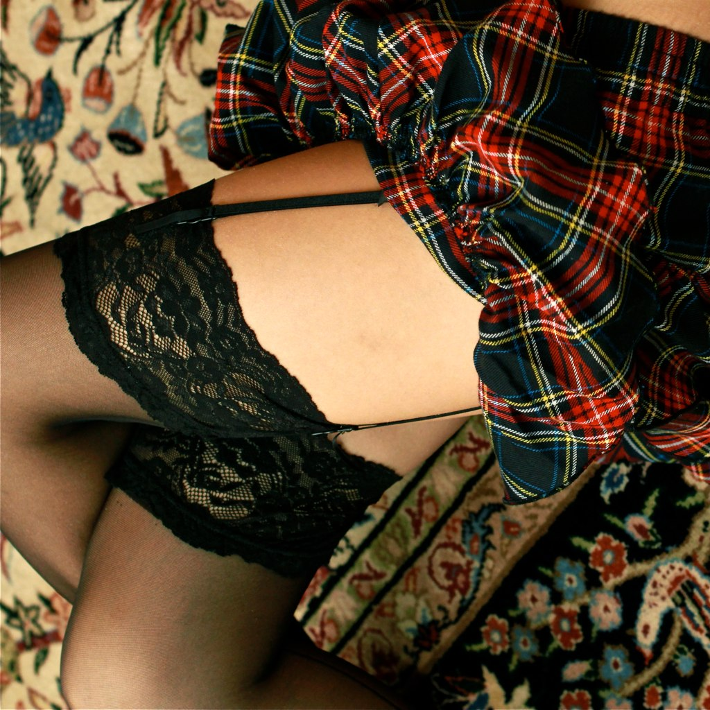 Fits well